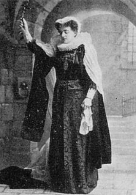 Helena Modrzejewska (1840-1909) as Maria Stuart